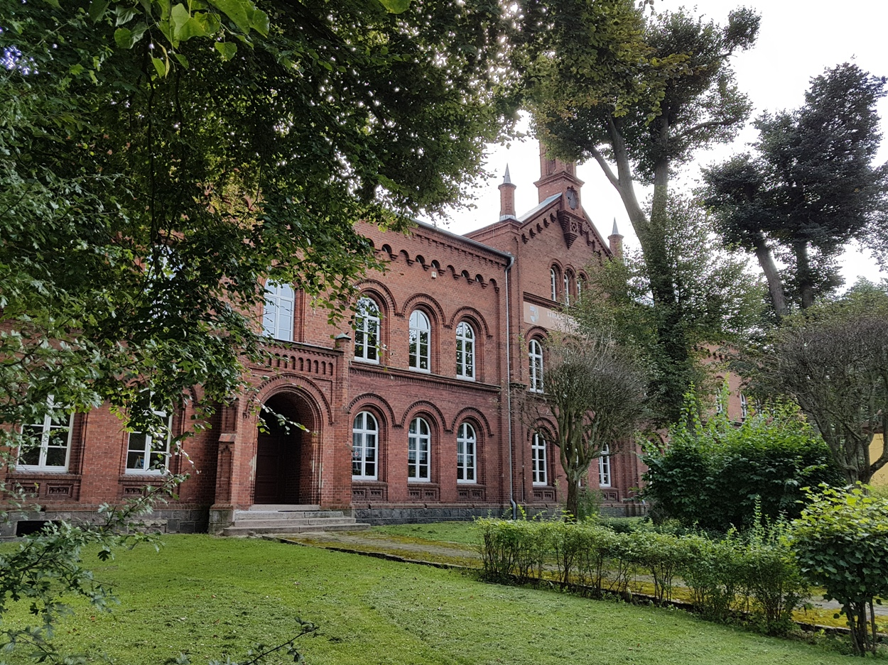 Budynek szkoły powstały w 1866 nie zmienił swojej funkcji od 151 lat